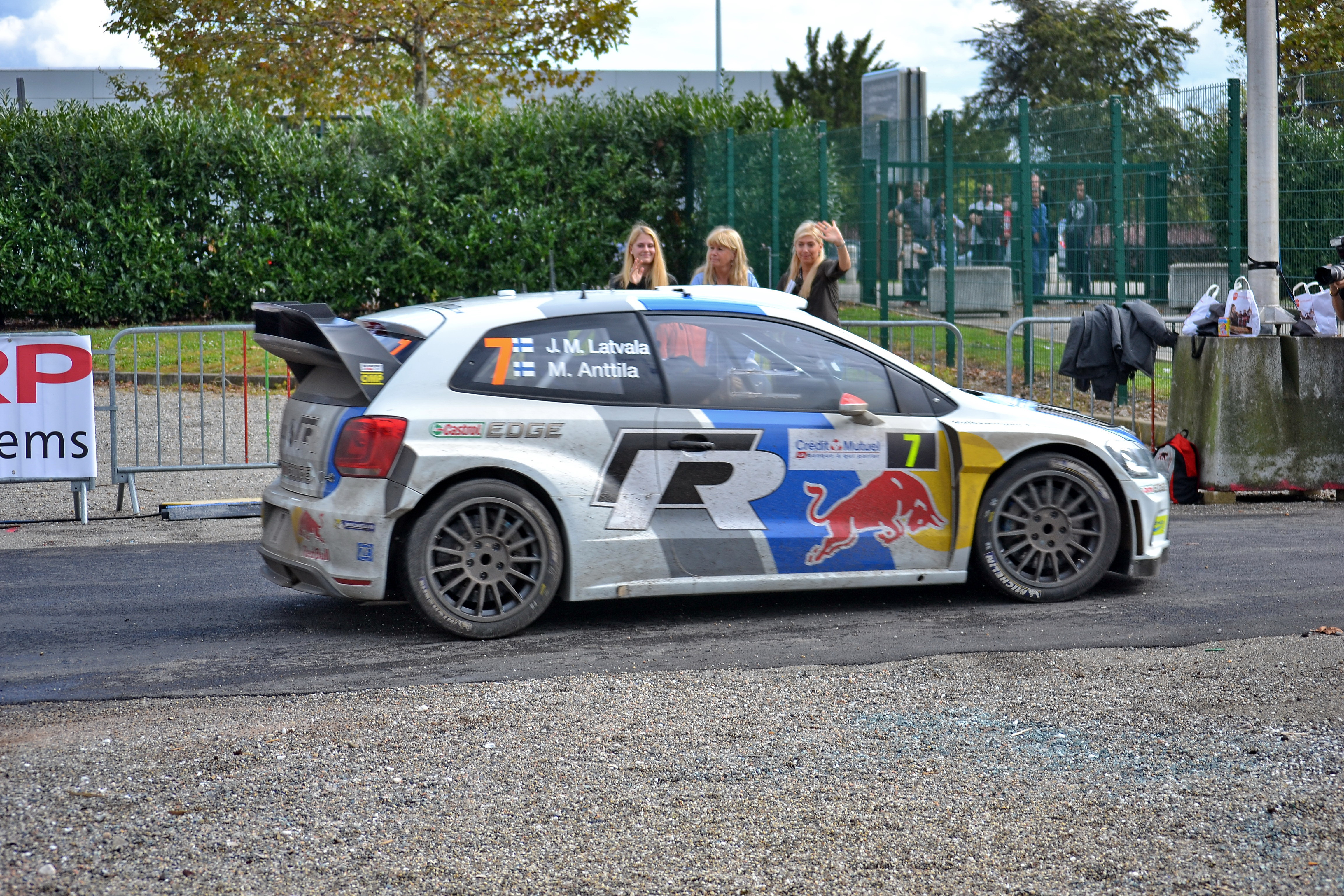 Jari-Matti Latvala au parc d'assistance de Colmar durant le Rallye de France-Alsace 2013.